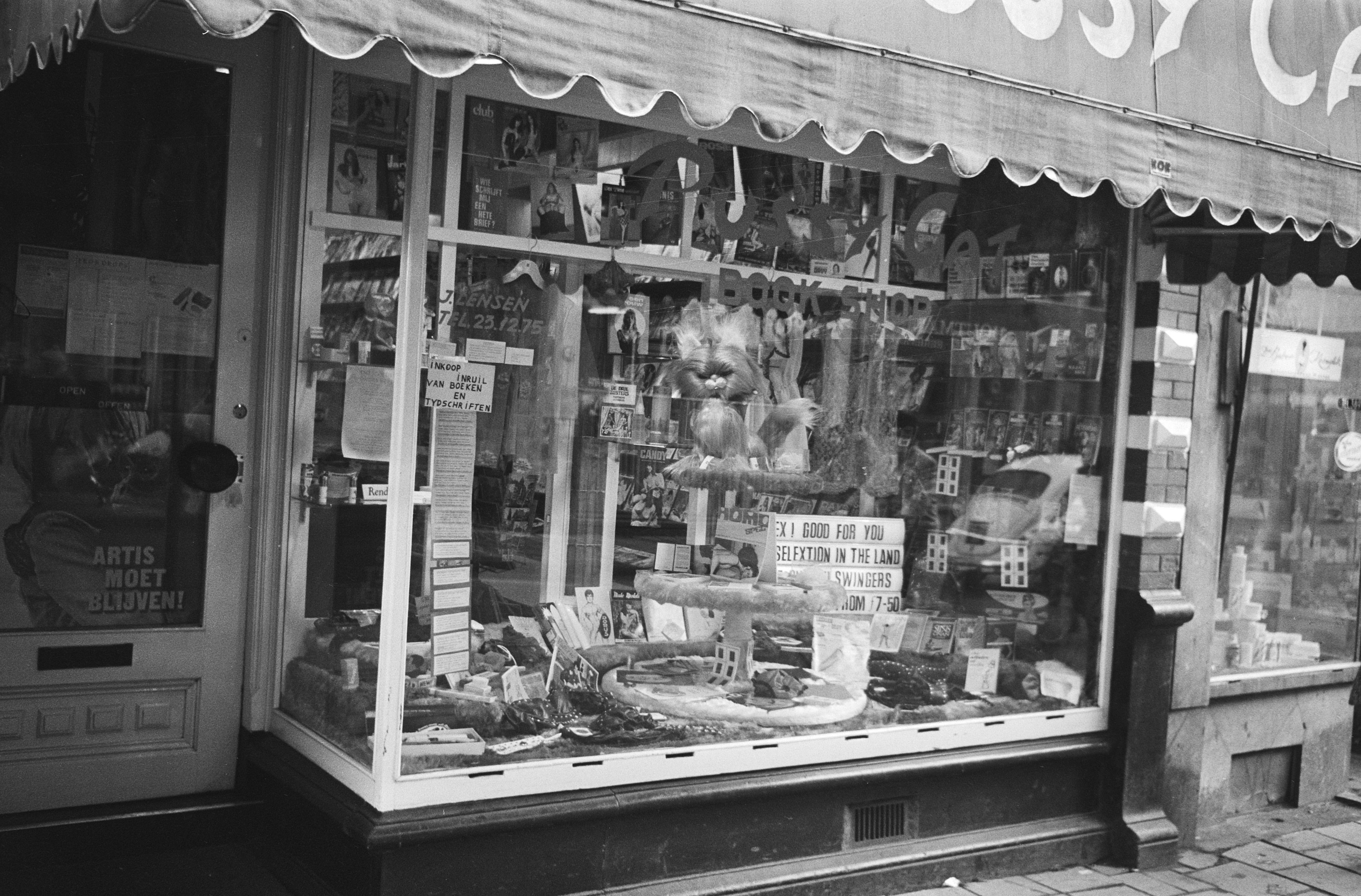 Collectie / Archief : Fotocollectie Anefo Reportage / Serie : [ onbekend ] Beschrijving : Sex-shops in Amsterdam; interieurs en exterieurs Datum : 19 januari 1971 Locatie : Amsterdam, Noord-Holland Trefwoorden : winkels Fotograaf : Punt, […] / Anefo Auteursrechthebbende : Nationaal Archief Materiaalsoort : Negatief (zwart/wit) Nummer archiefinventaris : bekijk toegang 2.24.01.05 Bestanddeelnummer : 924-1897